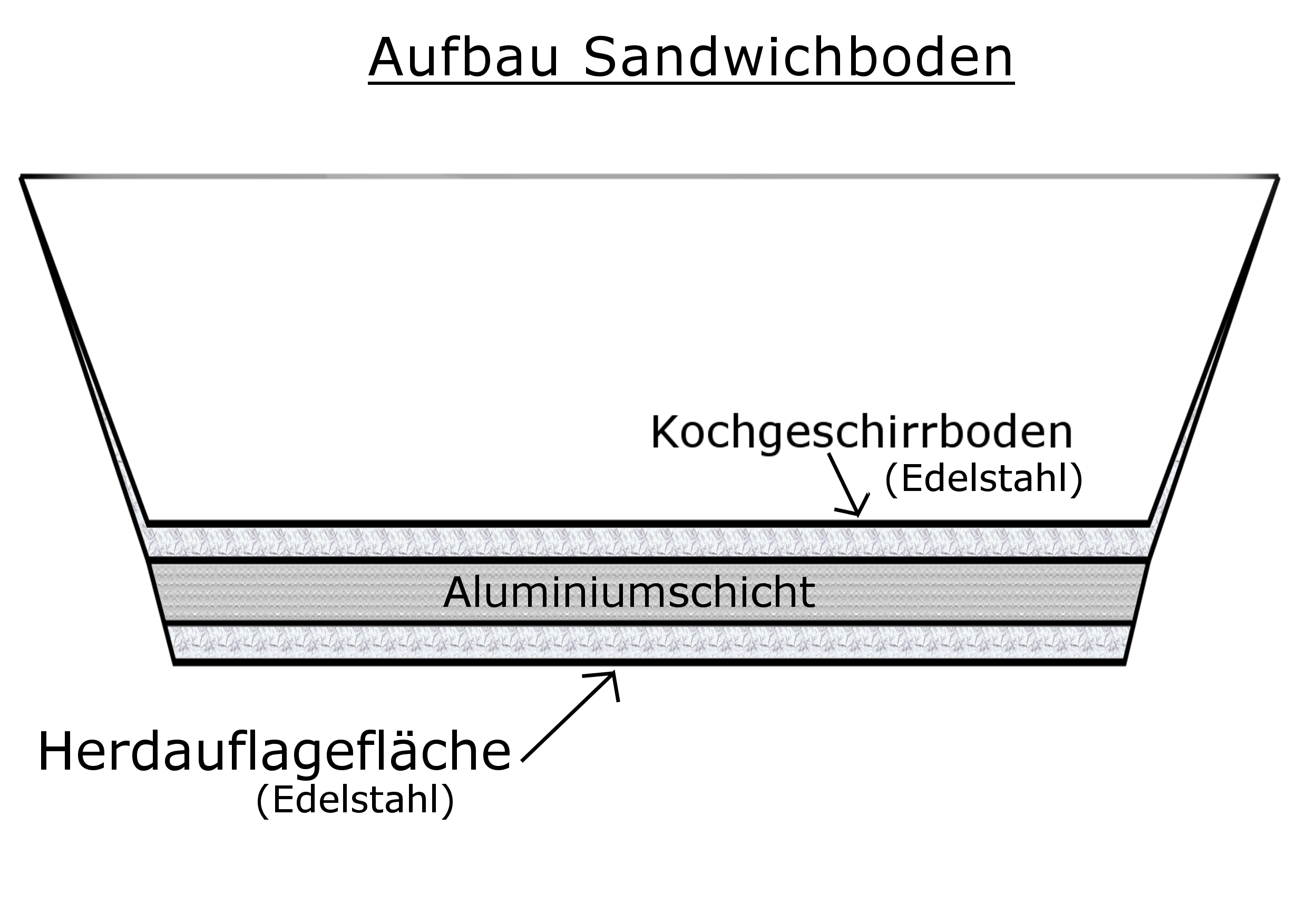 Schematischer Aufbau eines Sandwich-Thermobodens. Die Schichten sind wie folgt aufgebaut: Herdauflagefläche aus Edelstahl, Kern aus Aluminium und der Kochgeschirrboden aus Edelstahl.